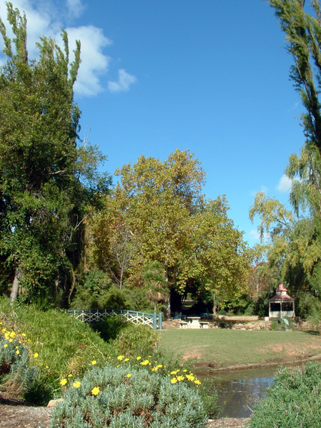 Wagga Wagga Botanical Gardens